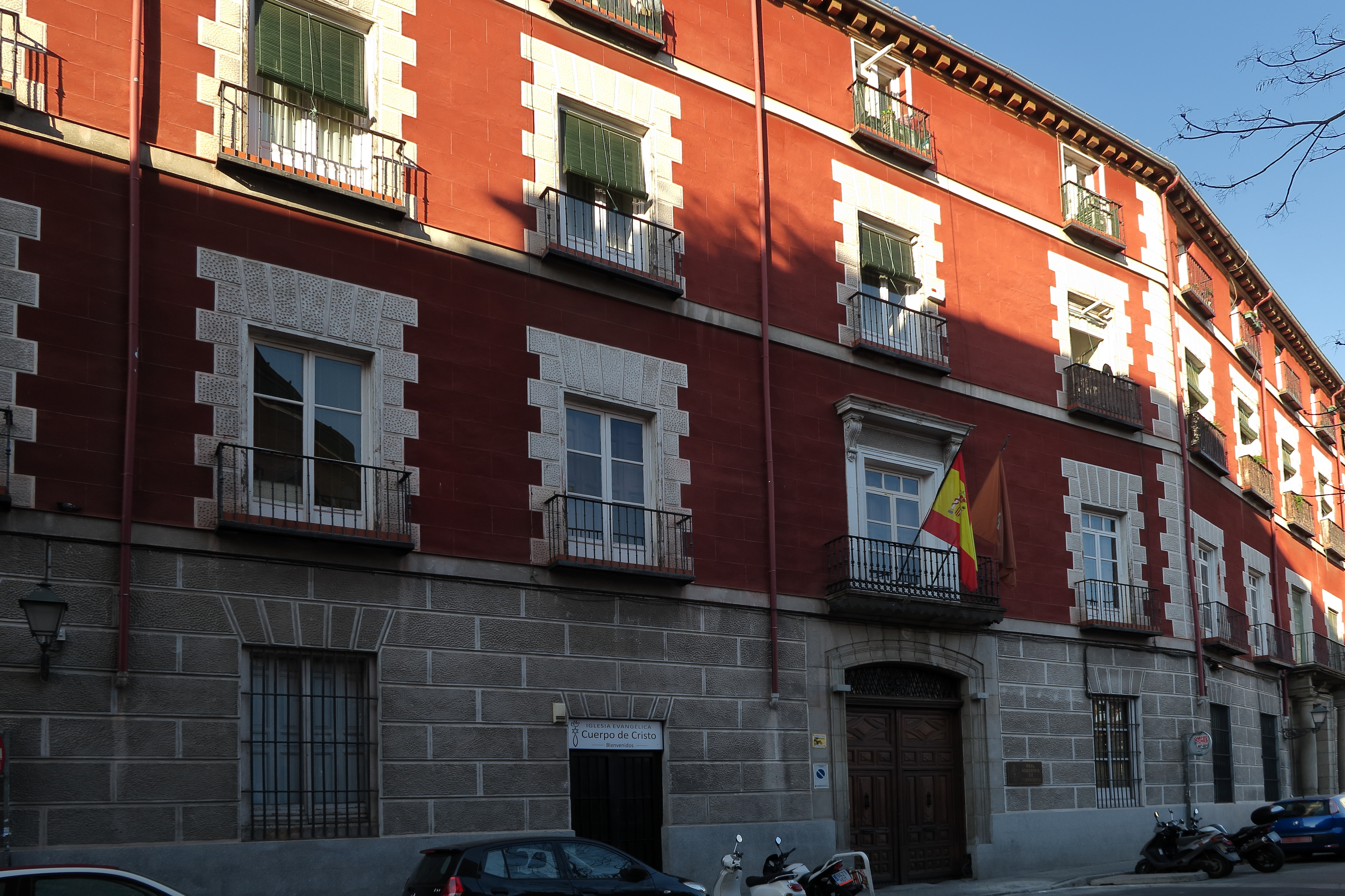 Real Academia de Ingeniería de España, fachada